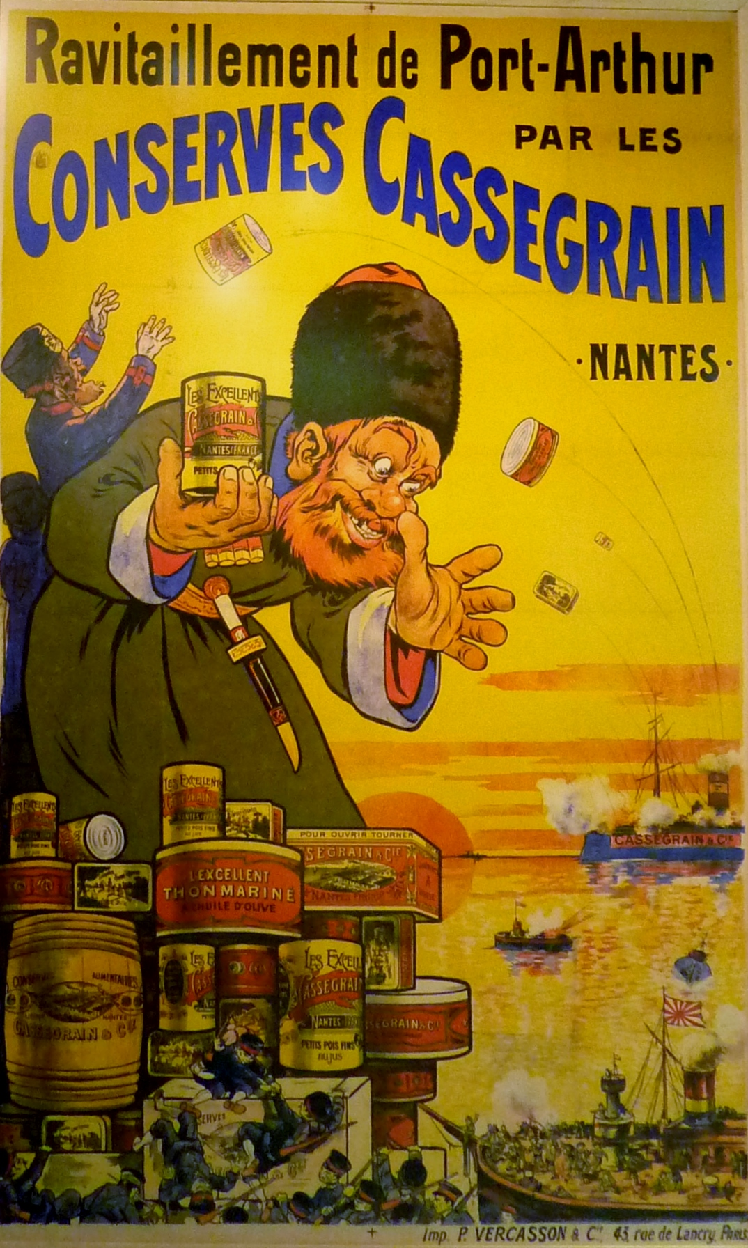 Eugène Alcide Ogé : Le ravitaillement de Port-Arthur par les conserves (Publicité Cassegrain ventant l'exportation de ses conserves jusqu'en Chine lors de la guerre russo-japonaise de 1904, affiche, musée de Bretagne, Rennes).